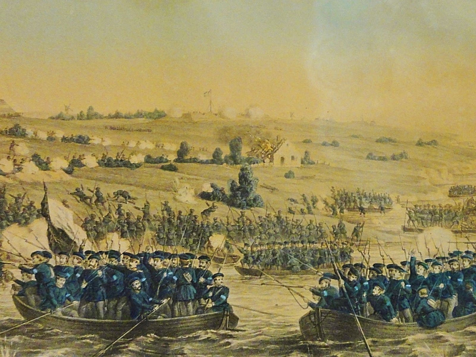 Übergang nach Alsen